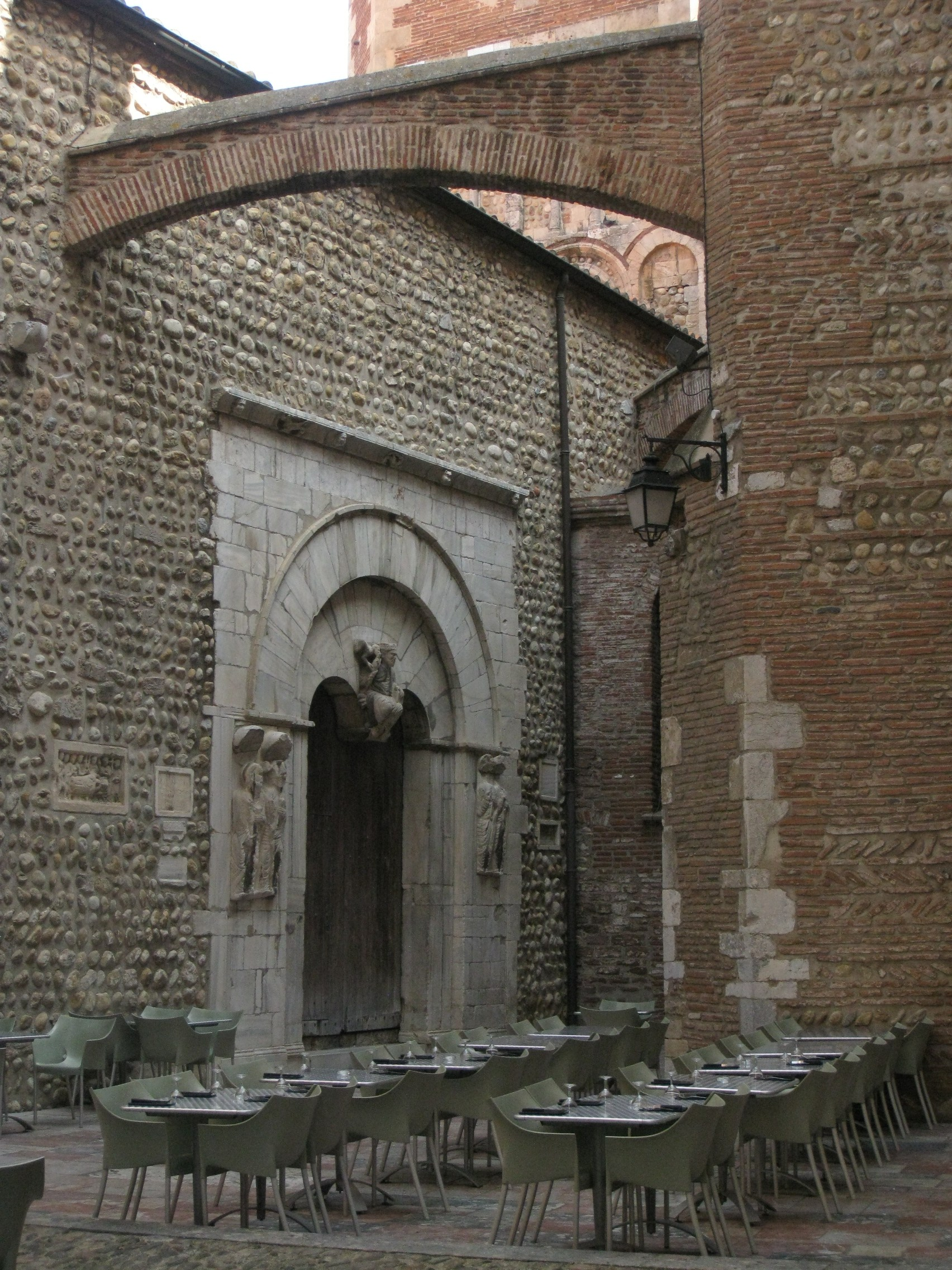 Església de Sant Joan el Vell (Perpinyà), amb els contraforts que recolzen al mur nord de la Catedral .